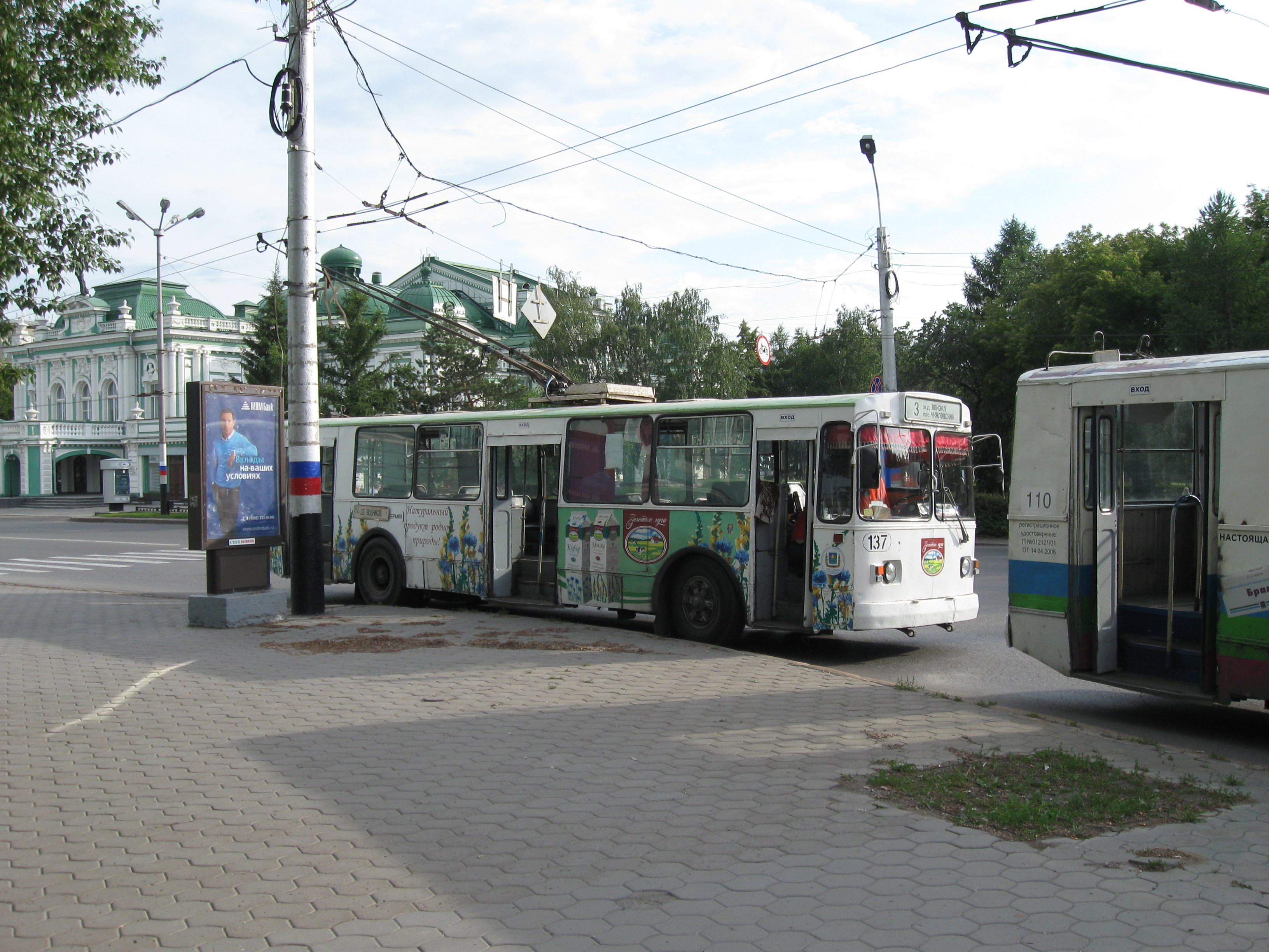 Троллейбус в центре Омска